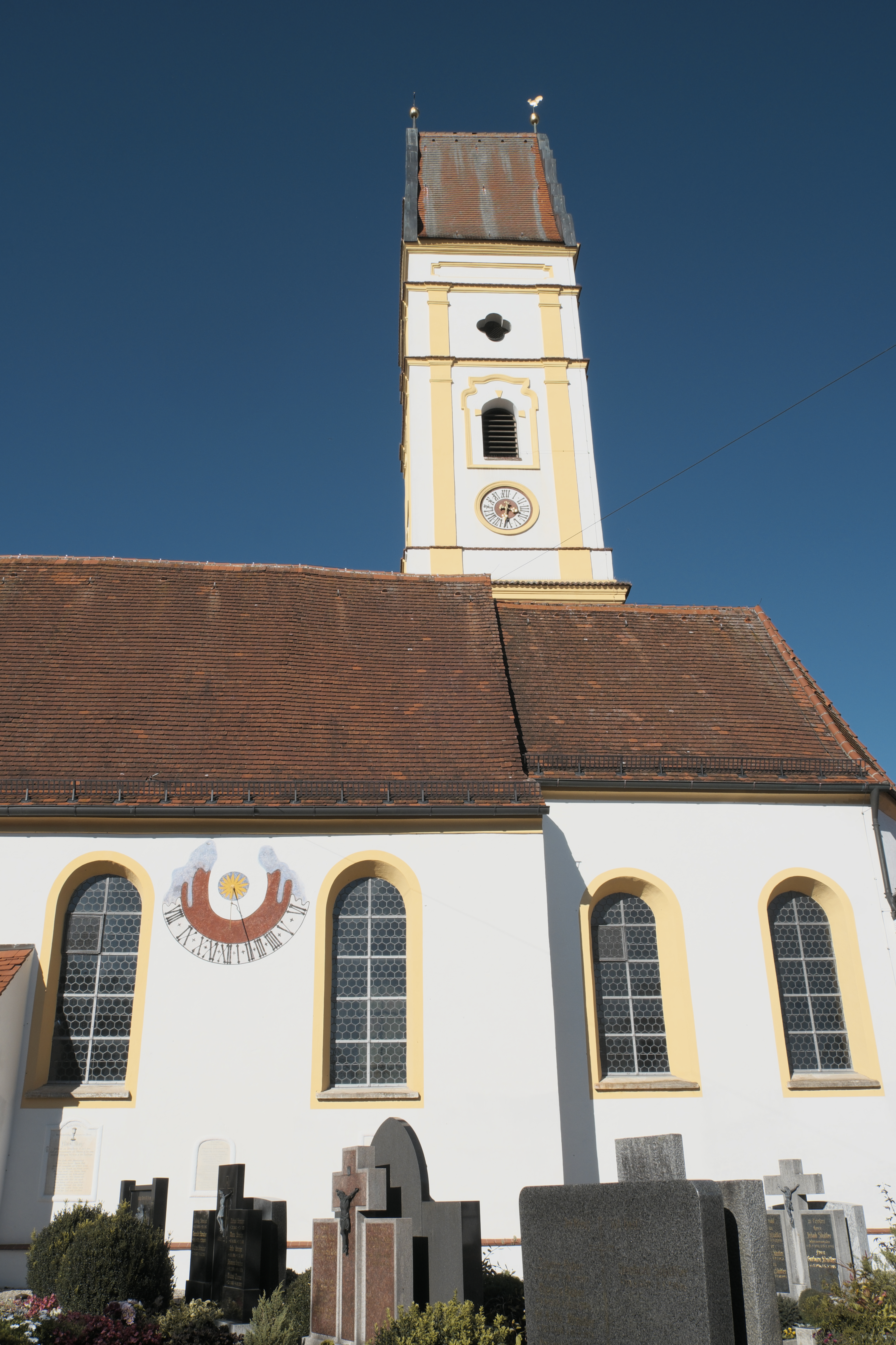 Katholische Pfarrkirche St. Petrus und Paulus in Petzenhausen, einem Ortsteil von Weil (Oberbayern) im Landkreis Landsberg am Lech (Bayern/Deutschland)